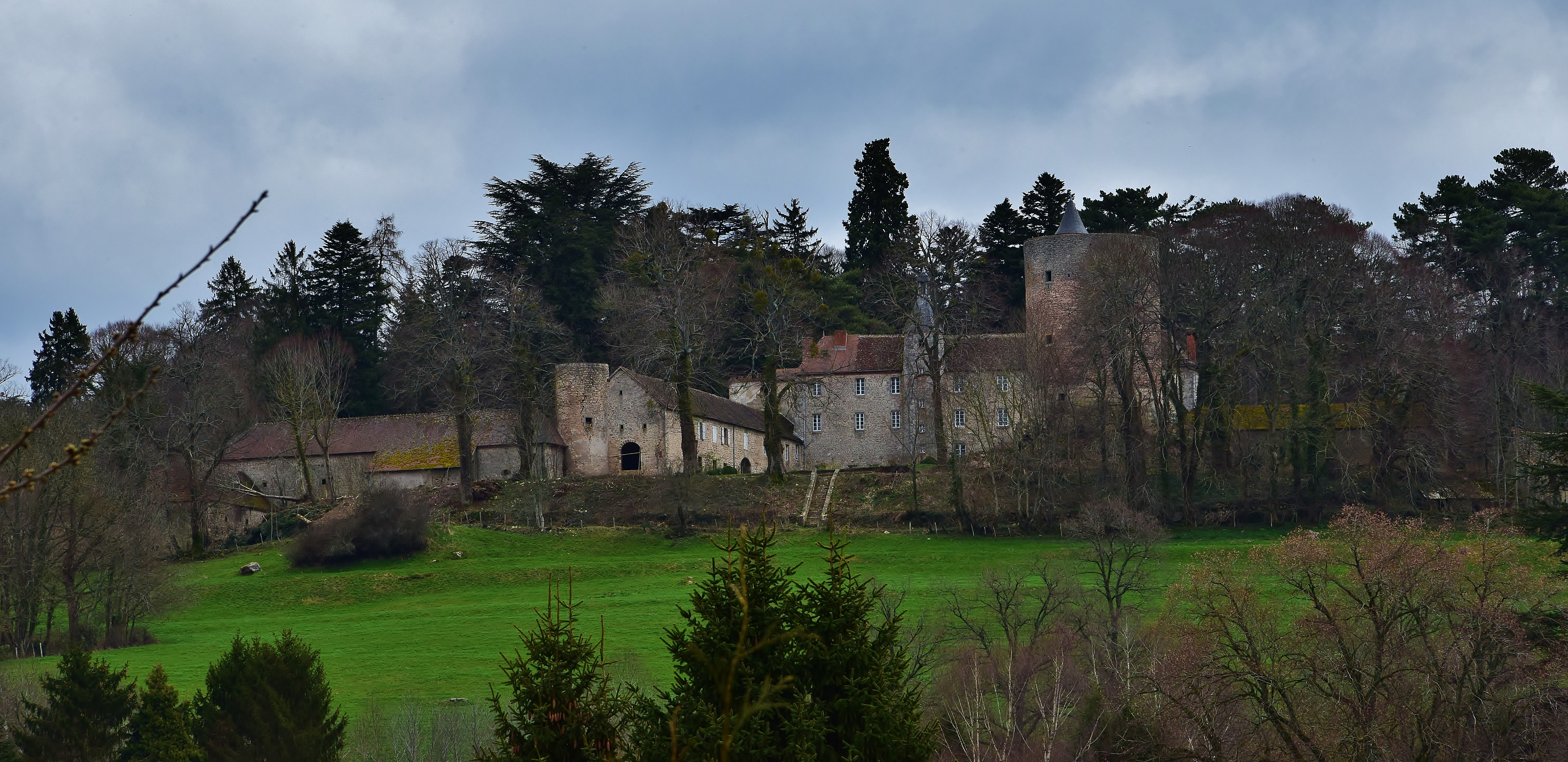 In April 3rd, 2015, ECHASSIERES, Allier, castle of Beauvoir